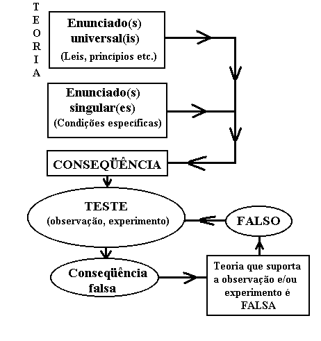 Fluxograma sobre epistemologia de Imre Lakatos: Programa de Pesquisa